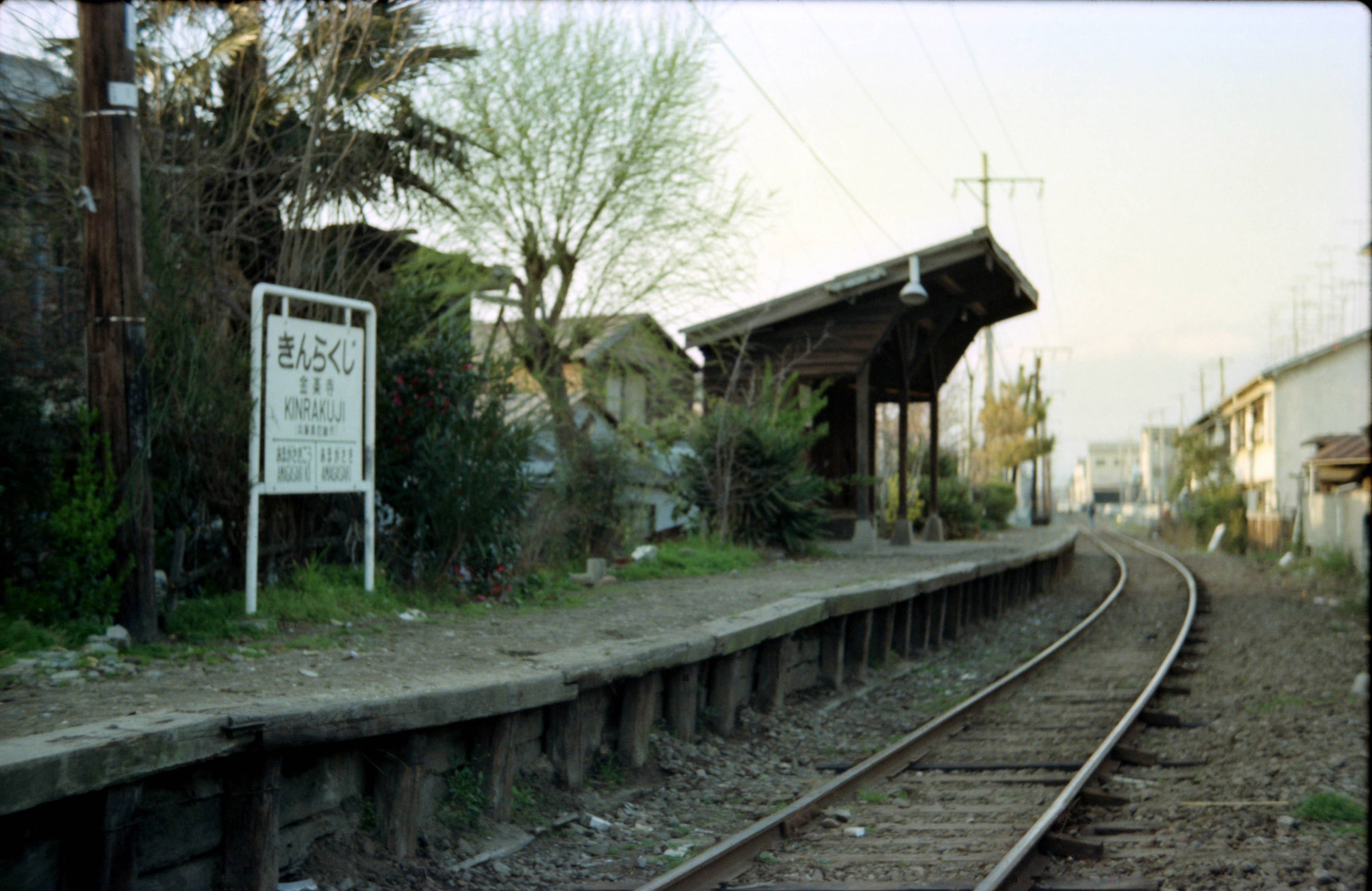 JNR Fukuchiyama-Line Kinrakuji sta